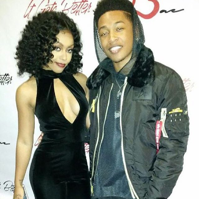 Listening Party